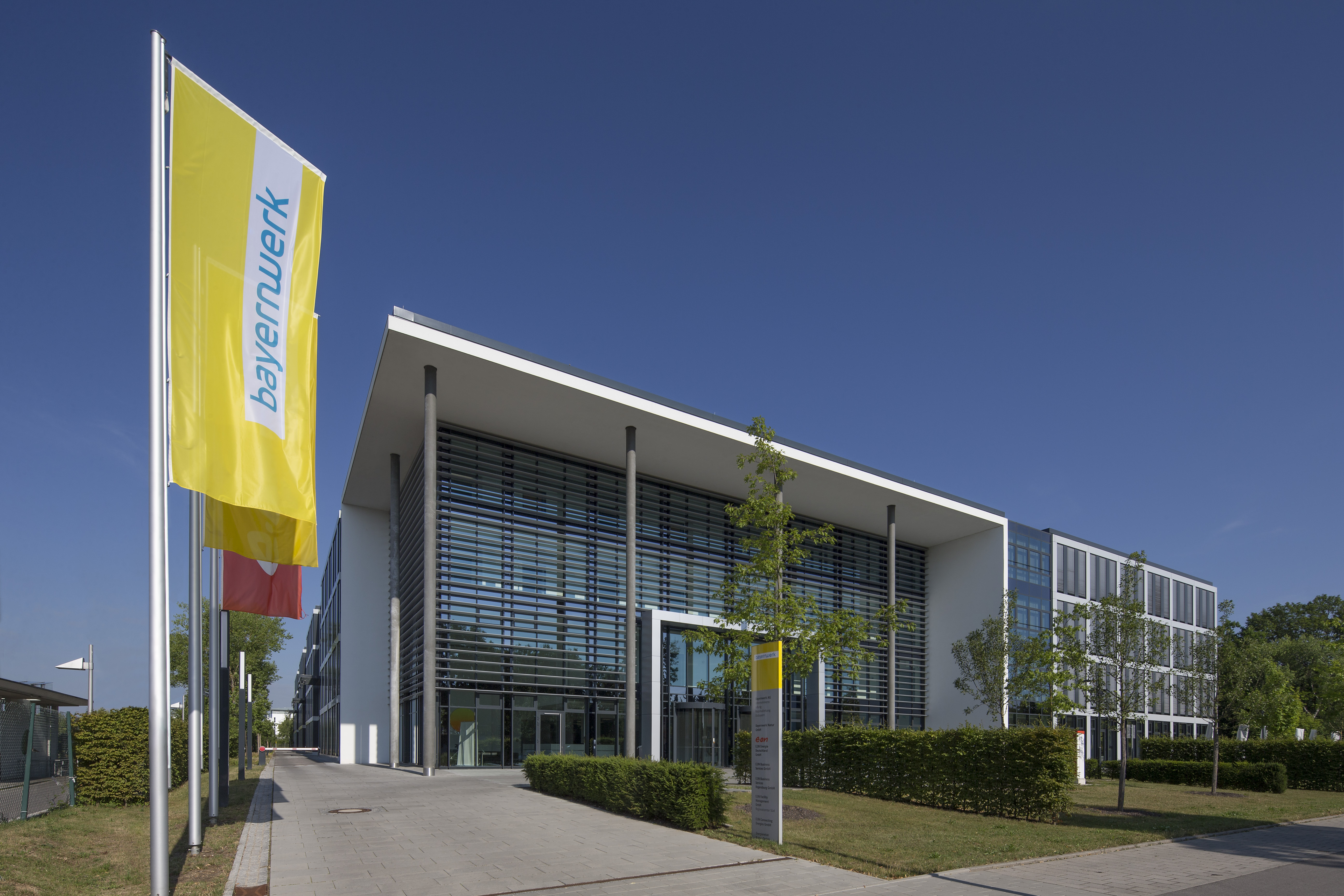 Bayernwerk AG, Unternehmensleitung und Regionalleitung (Niederbayern + Oberpfalz) in der Lilienthalstraße 7 in Regensburg